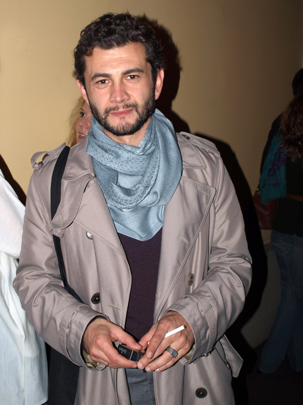 Vinicio Marchioni - Romanzo Criminale 2 - La Serie #9